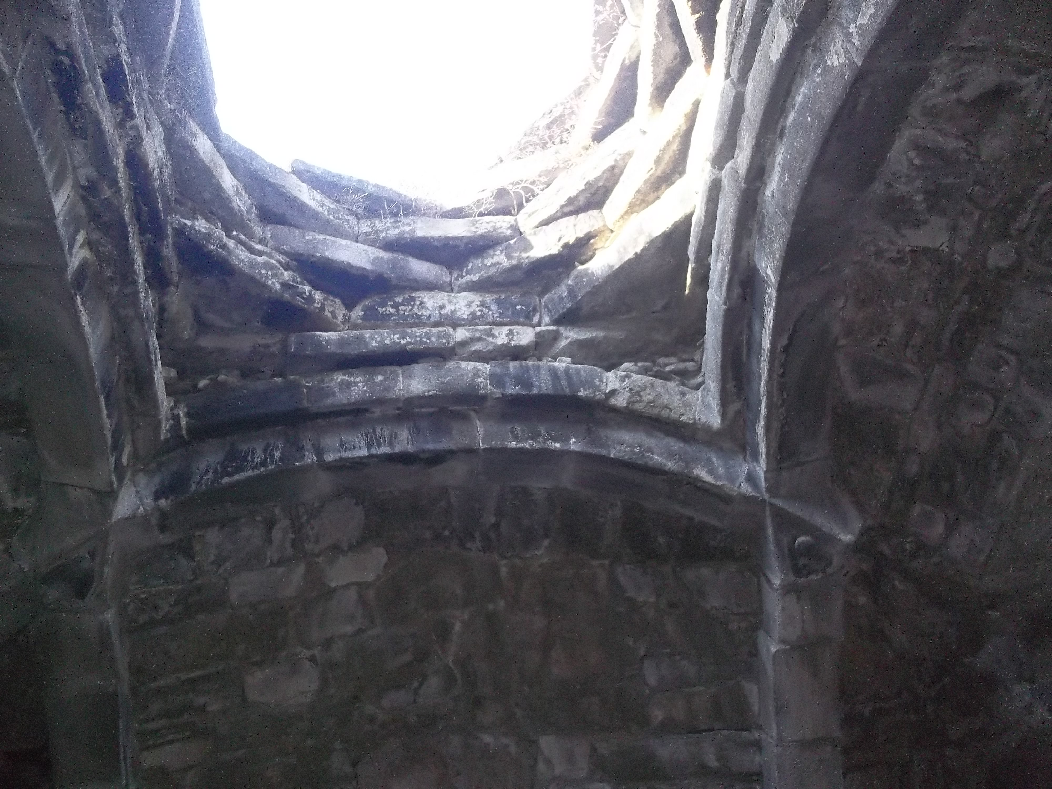 ՀՀ պատմամշակութային արգելոց-թանգարանների և պատմական միջավայրի պահպանության ծառայություն ՊՈԱԿ - Առաքելոց վանական համալիր - 8/6.12